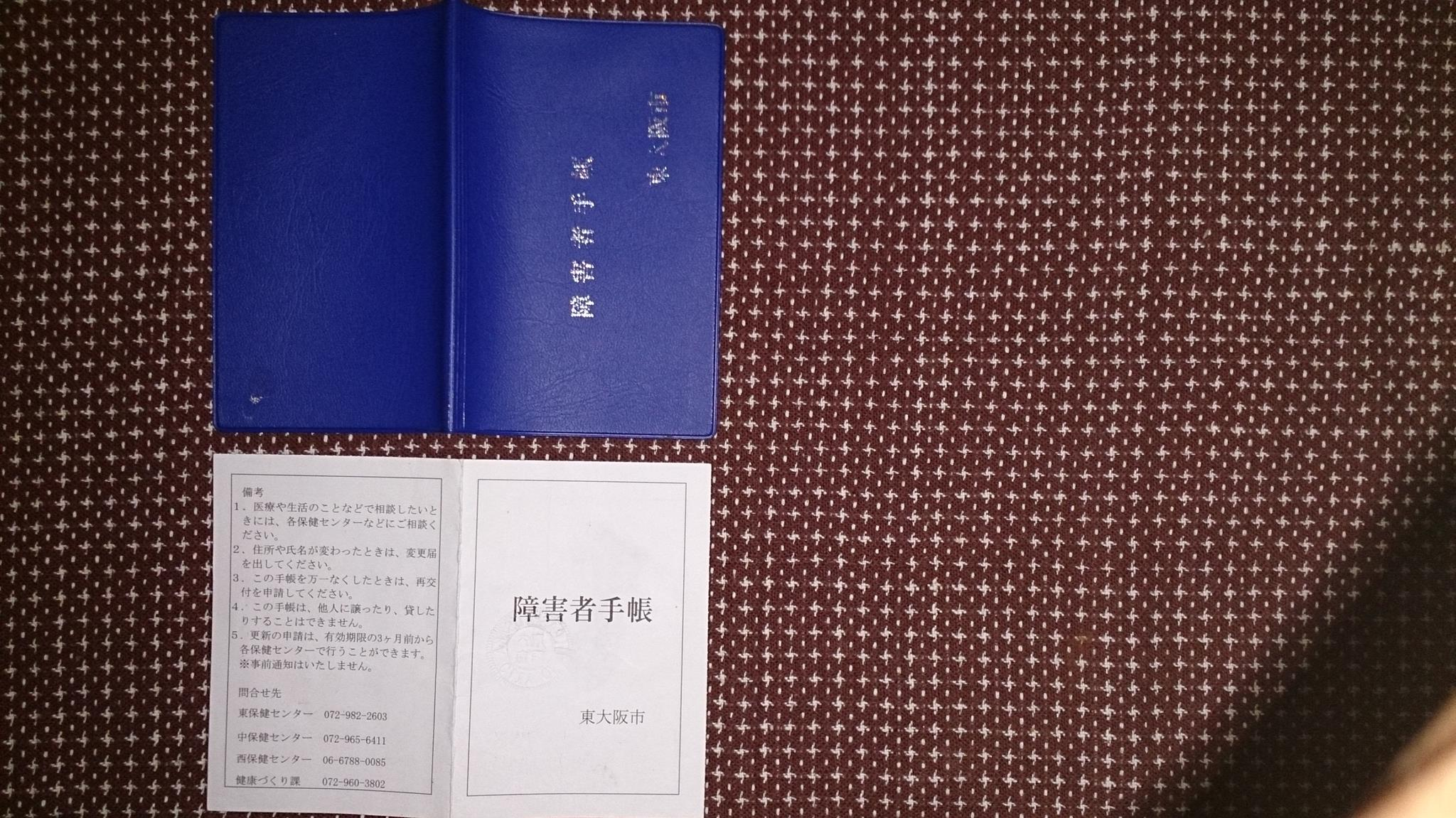 東大阪市の障害者手帳